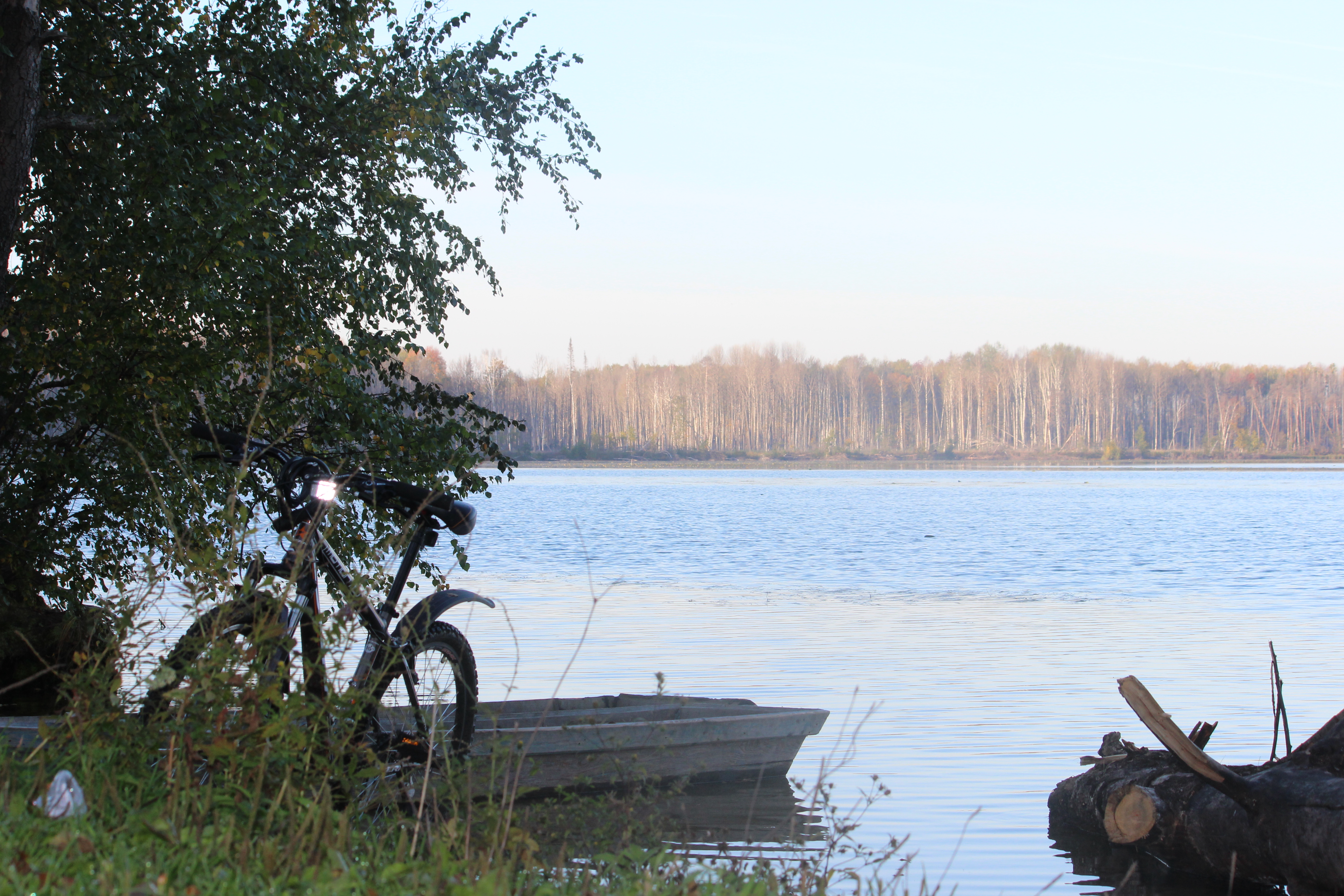 Озеро Шамьяры, Килемарский район This image is related to the protected area of Russia number 1210042